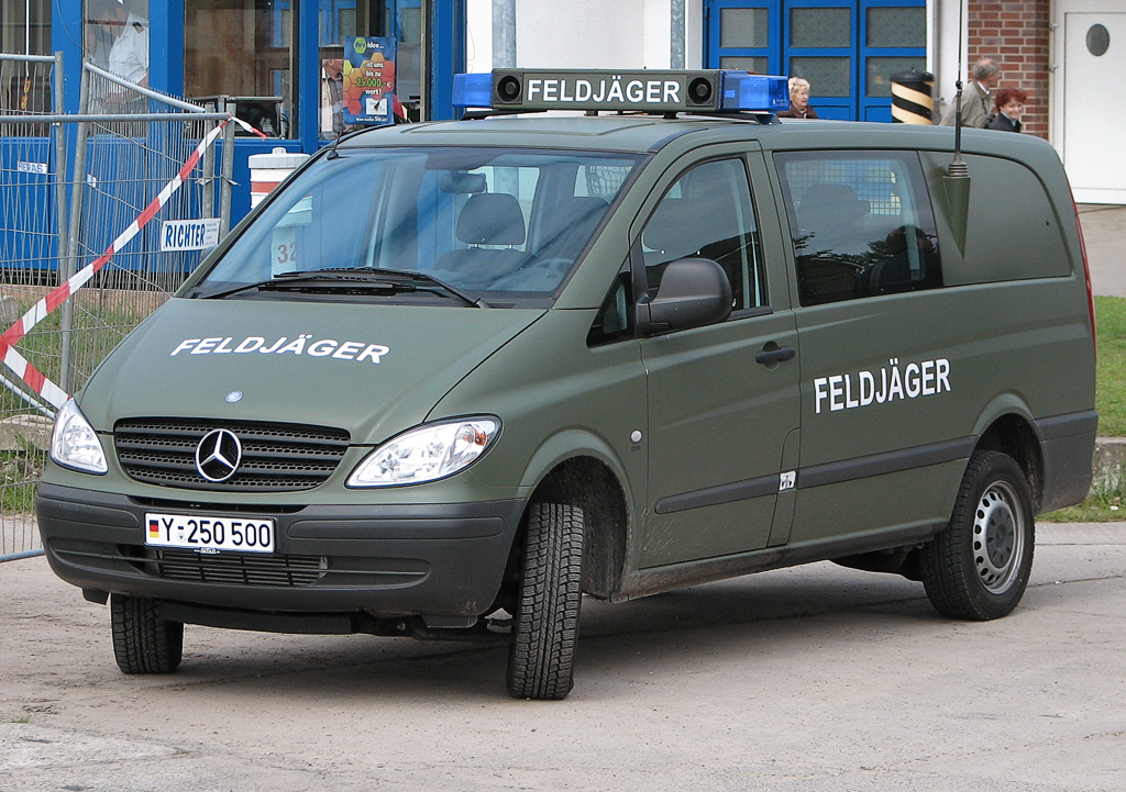 Beschreibung: Fahrzeug der Feldjäger Fotograf: Darkone, 13. August 2005